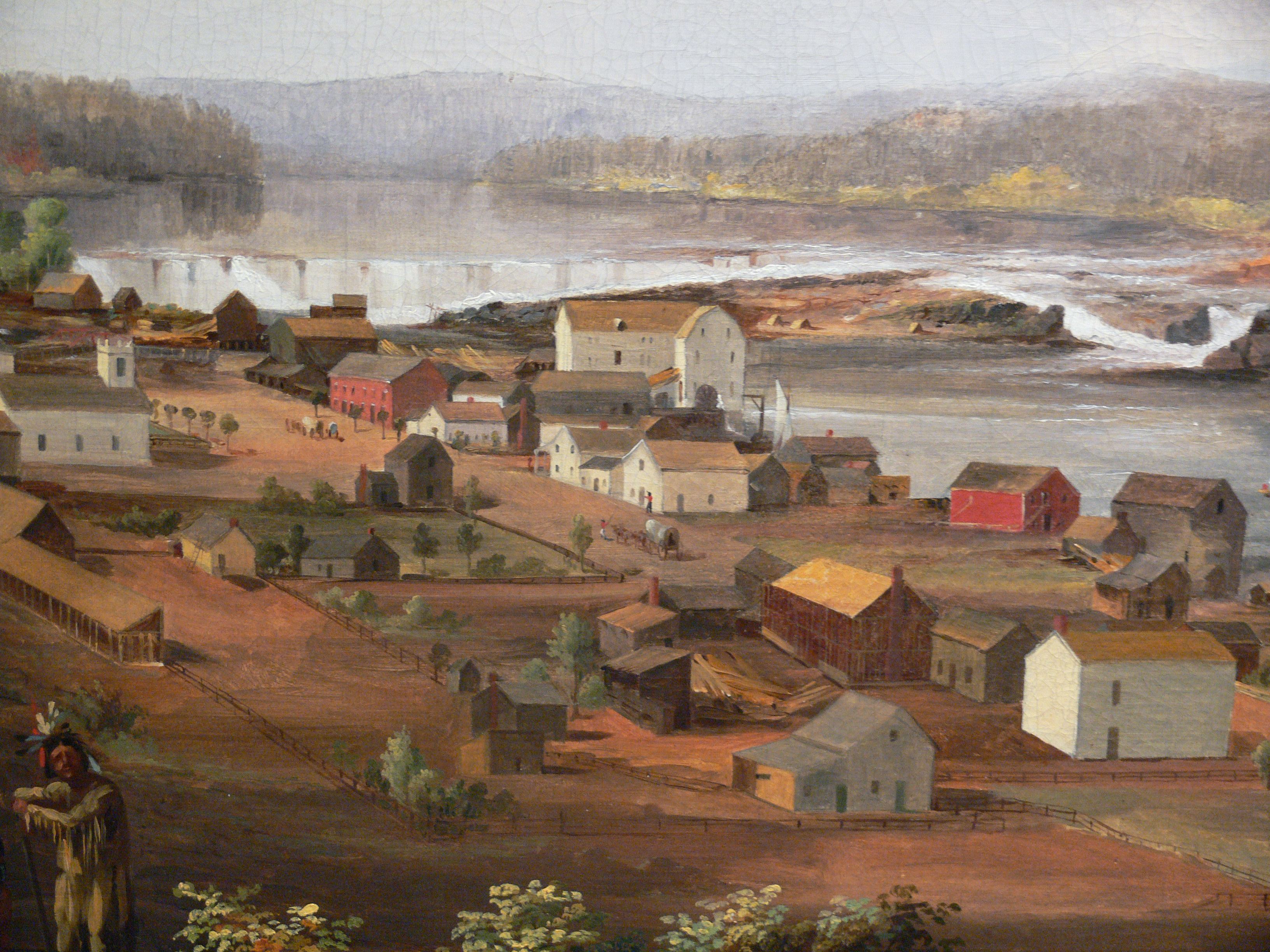 detail 1